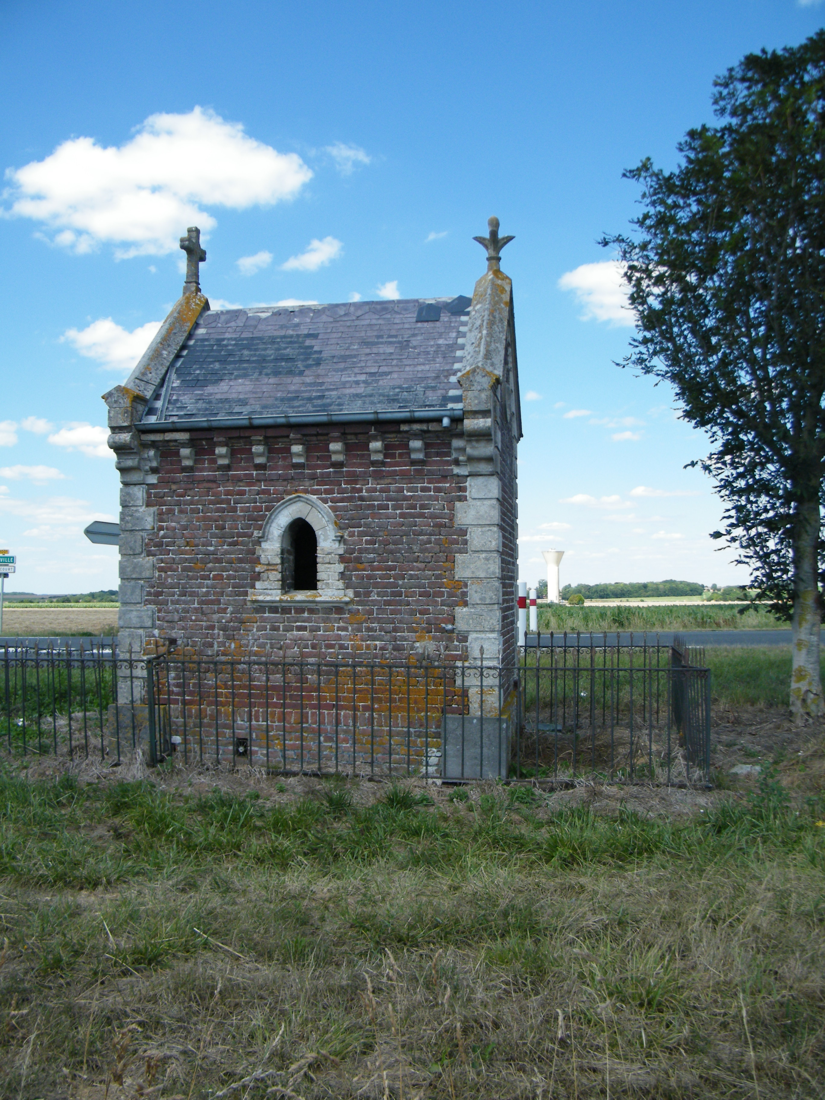 Francières (Somme, France), chapelle sur l'ancienne RN1.